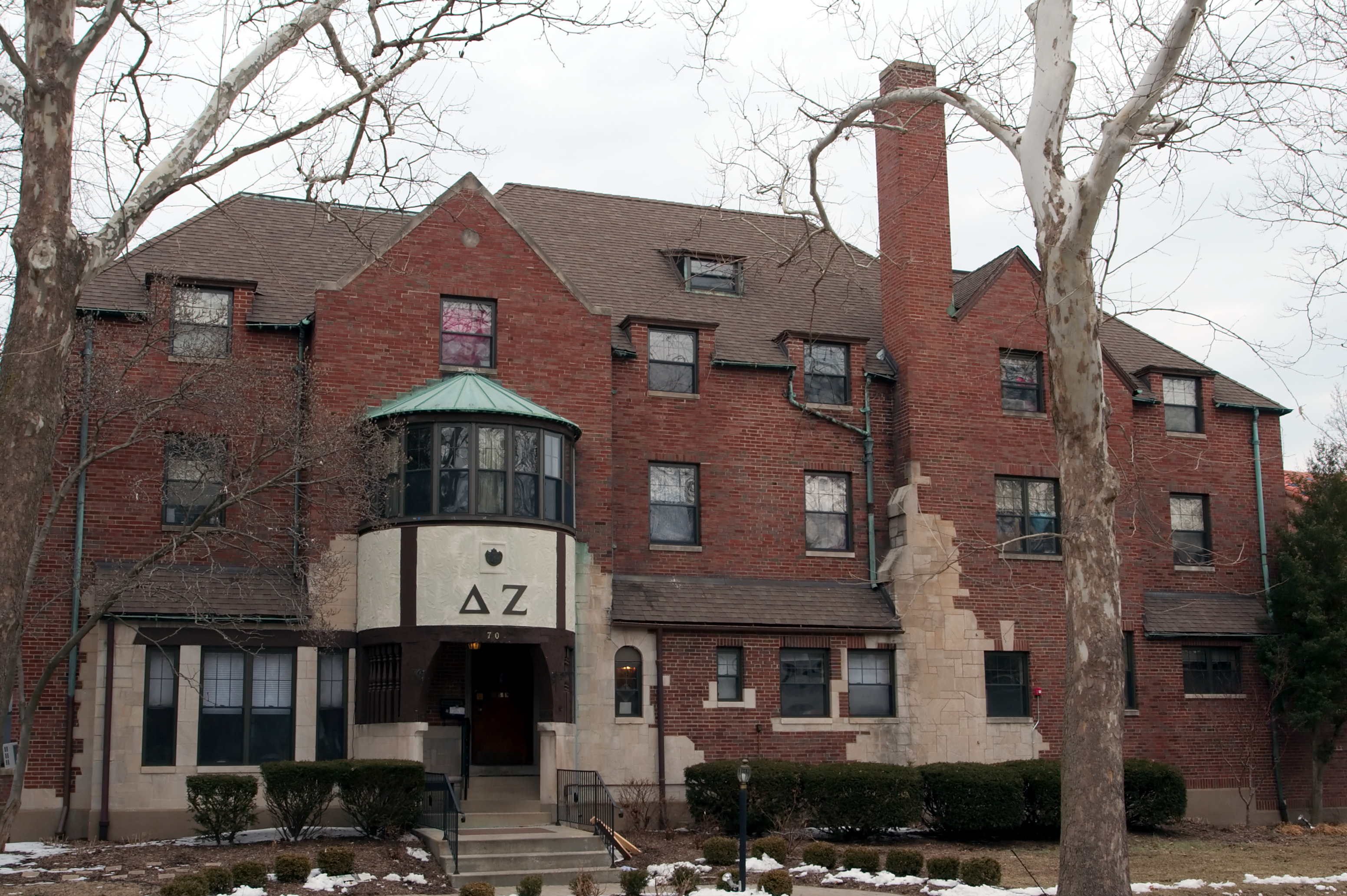 Delta Zeta house, at 710 W Ohio St, Urbana, IL